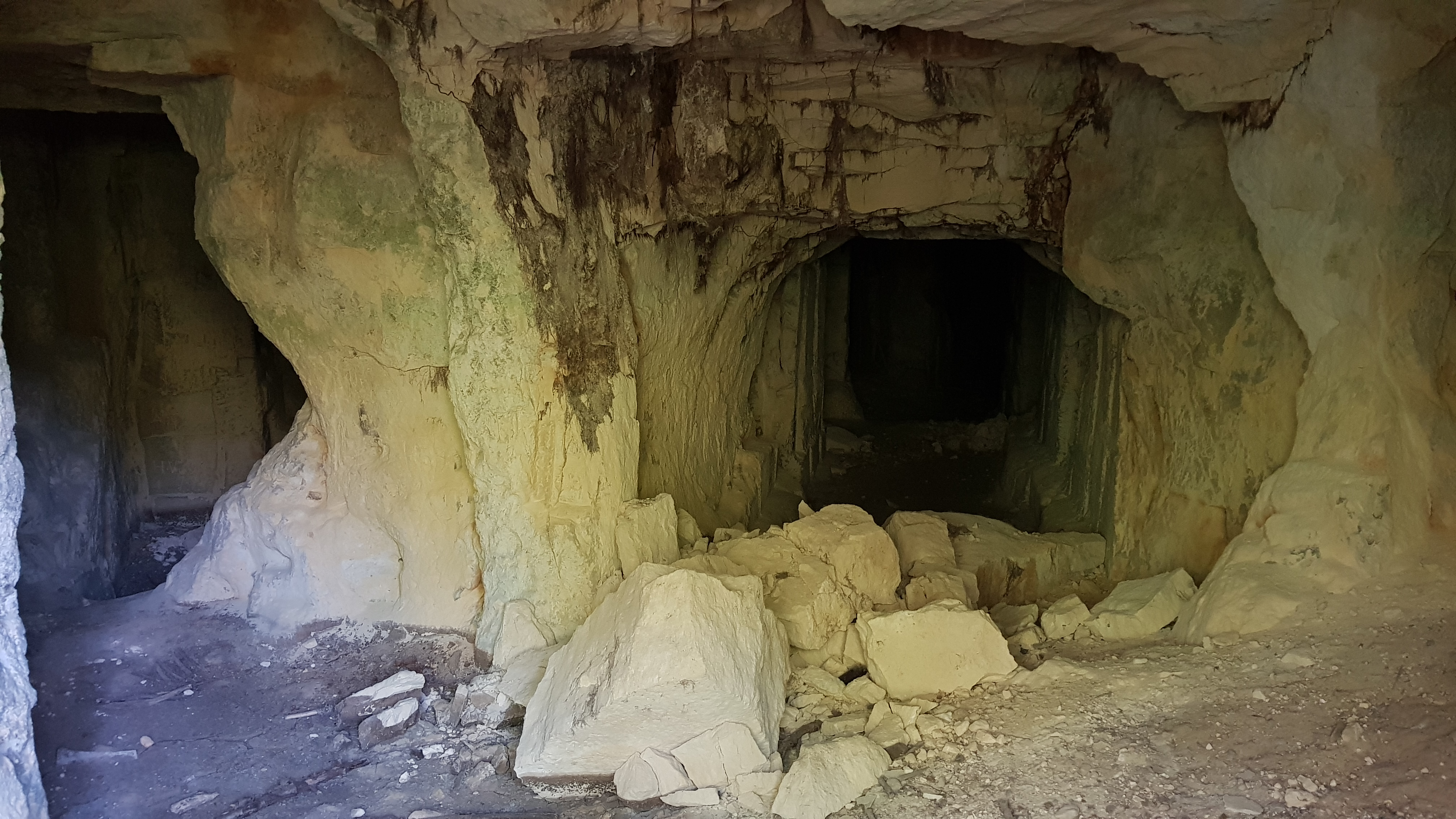 Kleinberggroeve Zuid in Savelsbos, Gronsveld, Nederland